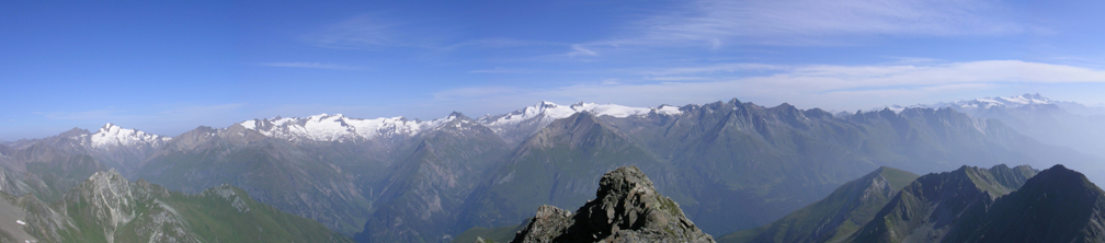 Panorama vom Lasörling auf die Simonygruppe (links), die Venedigergruppe (Mitte) und den Großglockner (rechts).